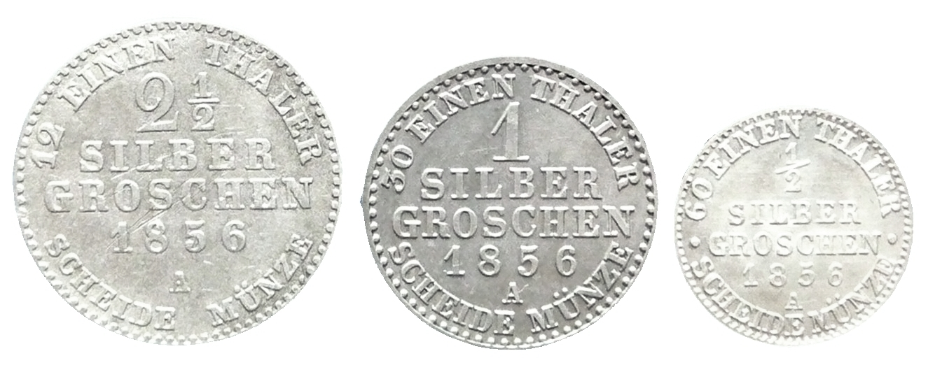 Silbergroschen Königreich Preußen 1856 Revers